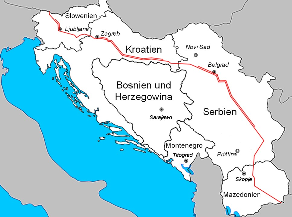 Autoput während den 1980er Jahren in Jugoslawien